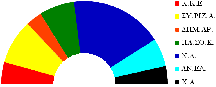 Κατανομή εδρών στο ελληνικό κοινοβούλιο